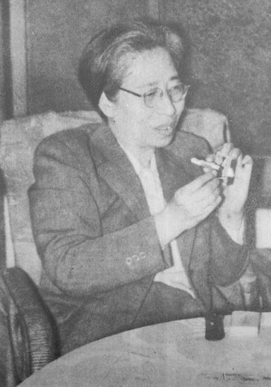 湯浅芳子